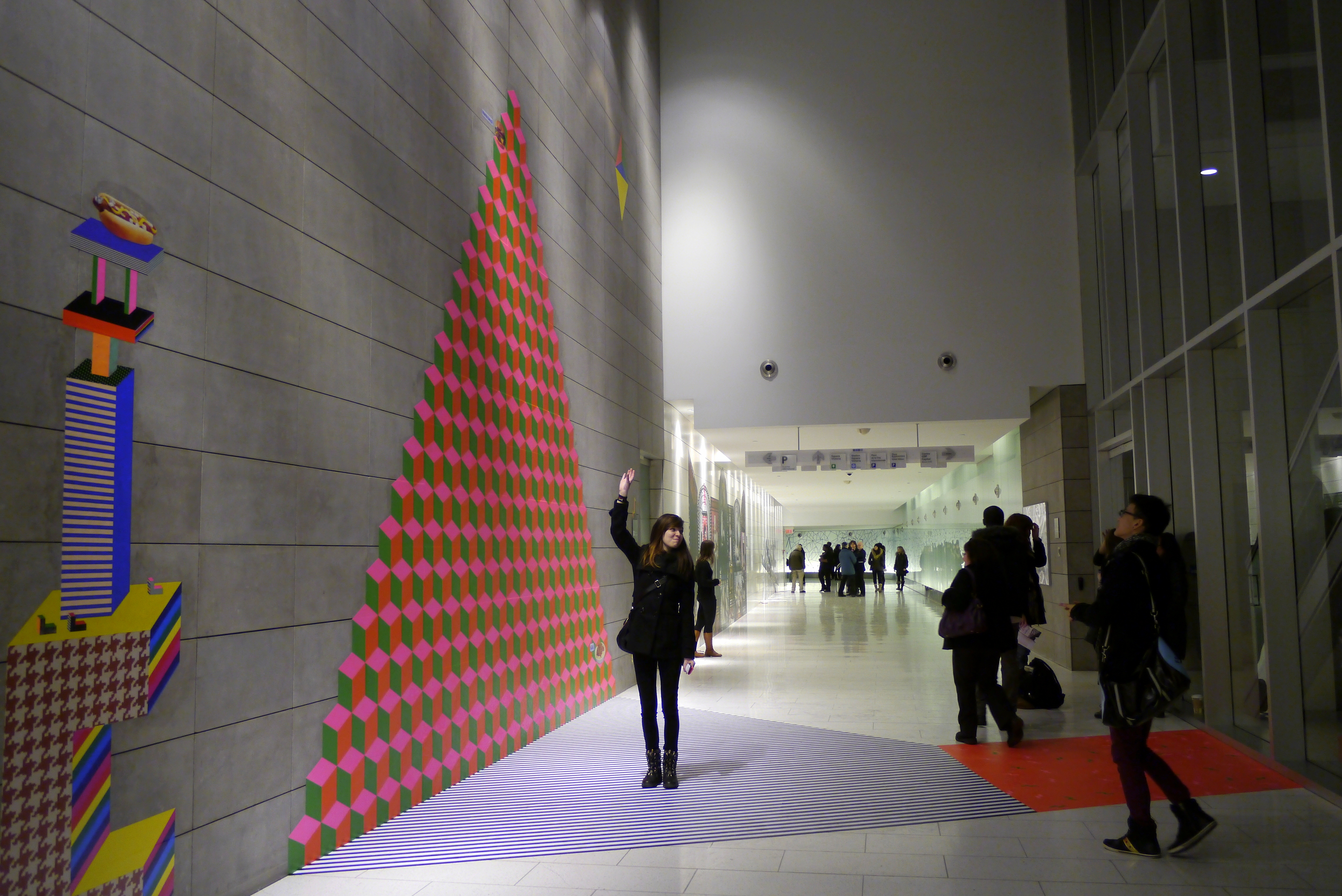 Installation Zone : Centre CDP Capital «Dominique Pétrin travaille l'image à ses plus hauts degrés de saturation et développe un dialogue intense entre les images, leur support et leur configuration. Pazzazz est une fresque gréco-romaine évoquant les music-hall des années soixante- dix. Excès, opulence et décadence sont représentés dans une ornementation abusive qui devient presque menaçante. Entre rêve et illusion, le mirage se perd dans un dédale entre plaisir et abus, jouissance et intoxication.»